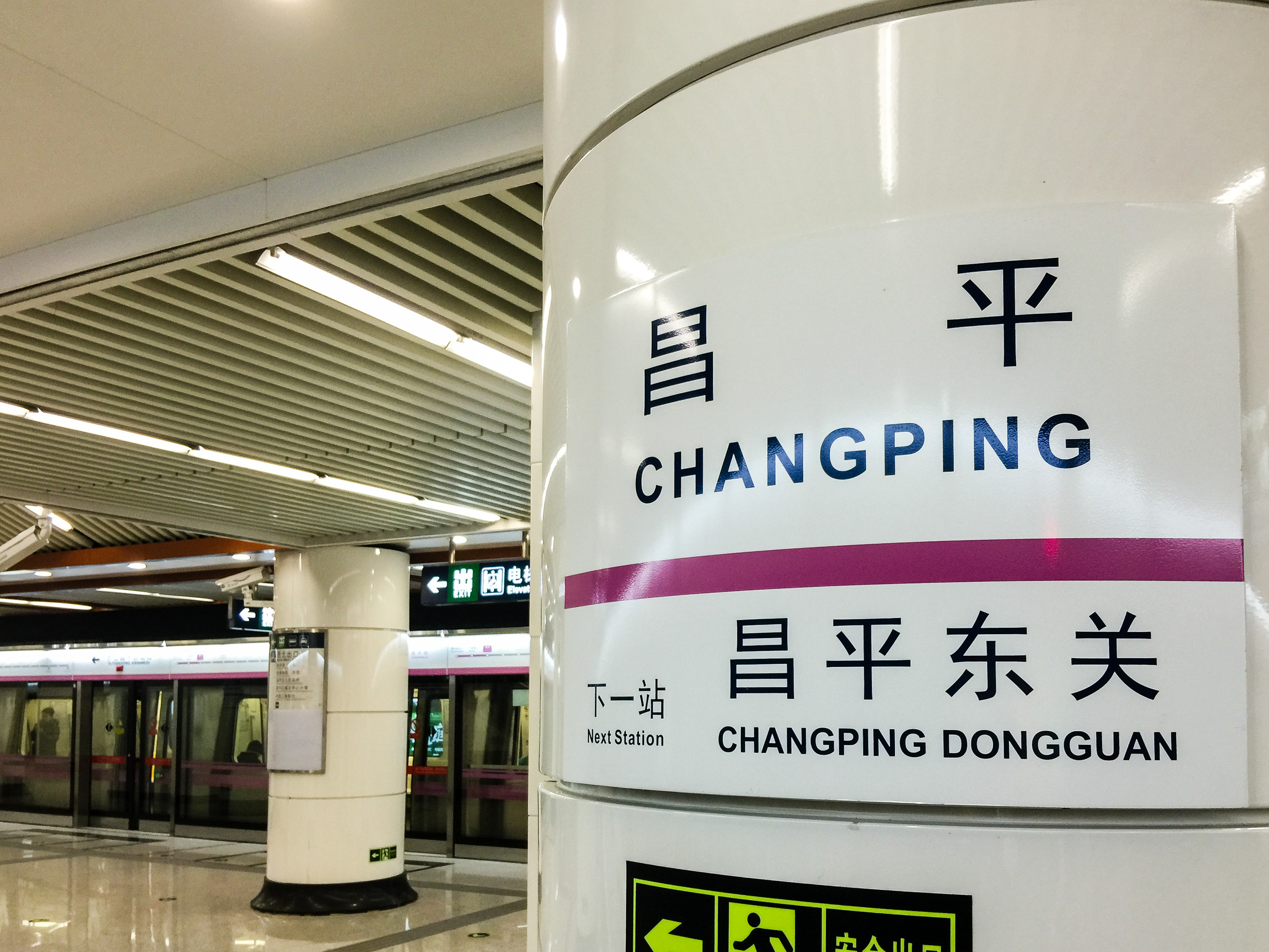 中文（中国大陆）: 北京地铁昌平线昌平站站台，2015年12月26日